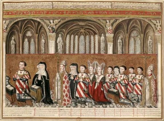 corrigé d'un relevé fait pour Gaignières, BNF numérisation Gallica, ancienne chapelle des Ursins actuellement Saint-Guillaume.